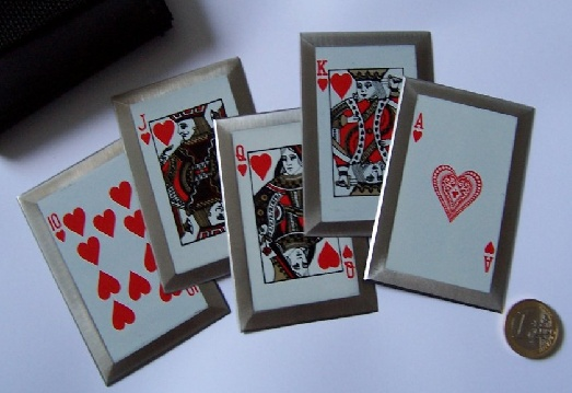 Photo de l'auteur